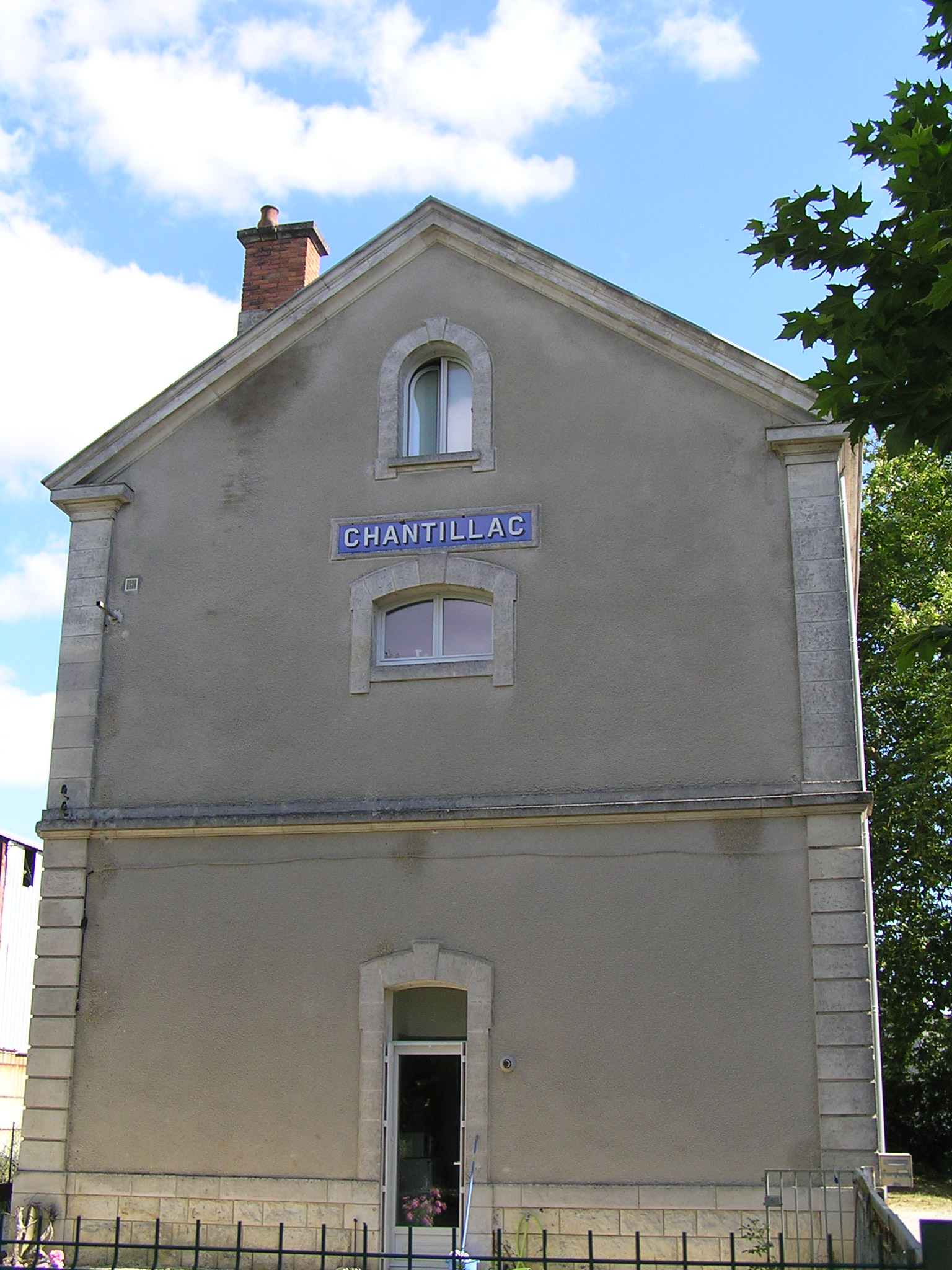 gare de Chantillac